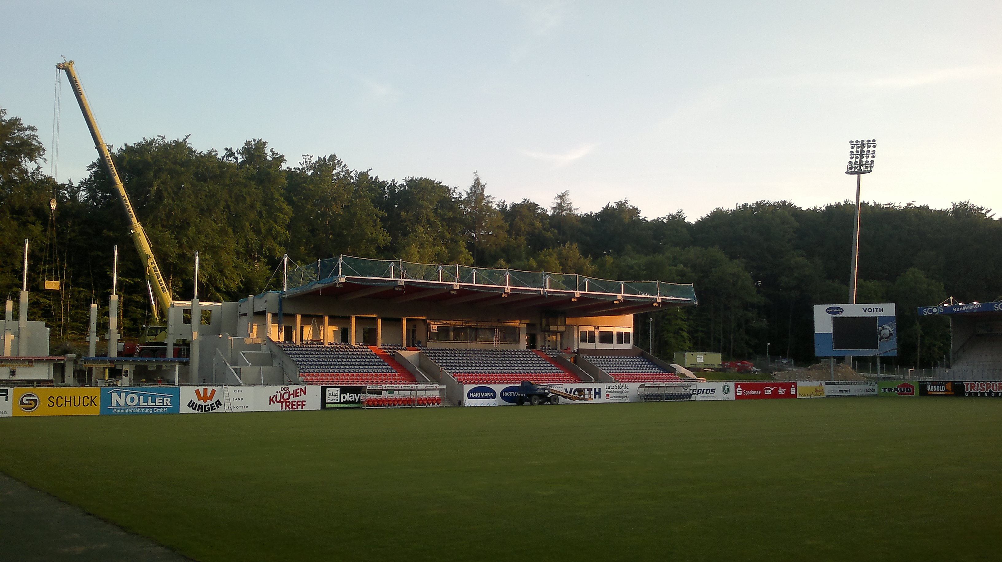 Umbau der Südtribüne der Voith-Arena, Heidenheim.